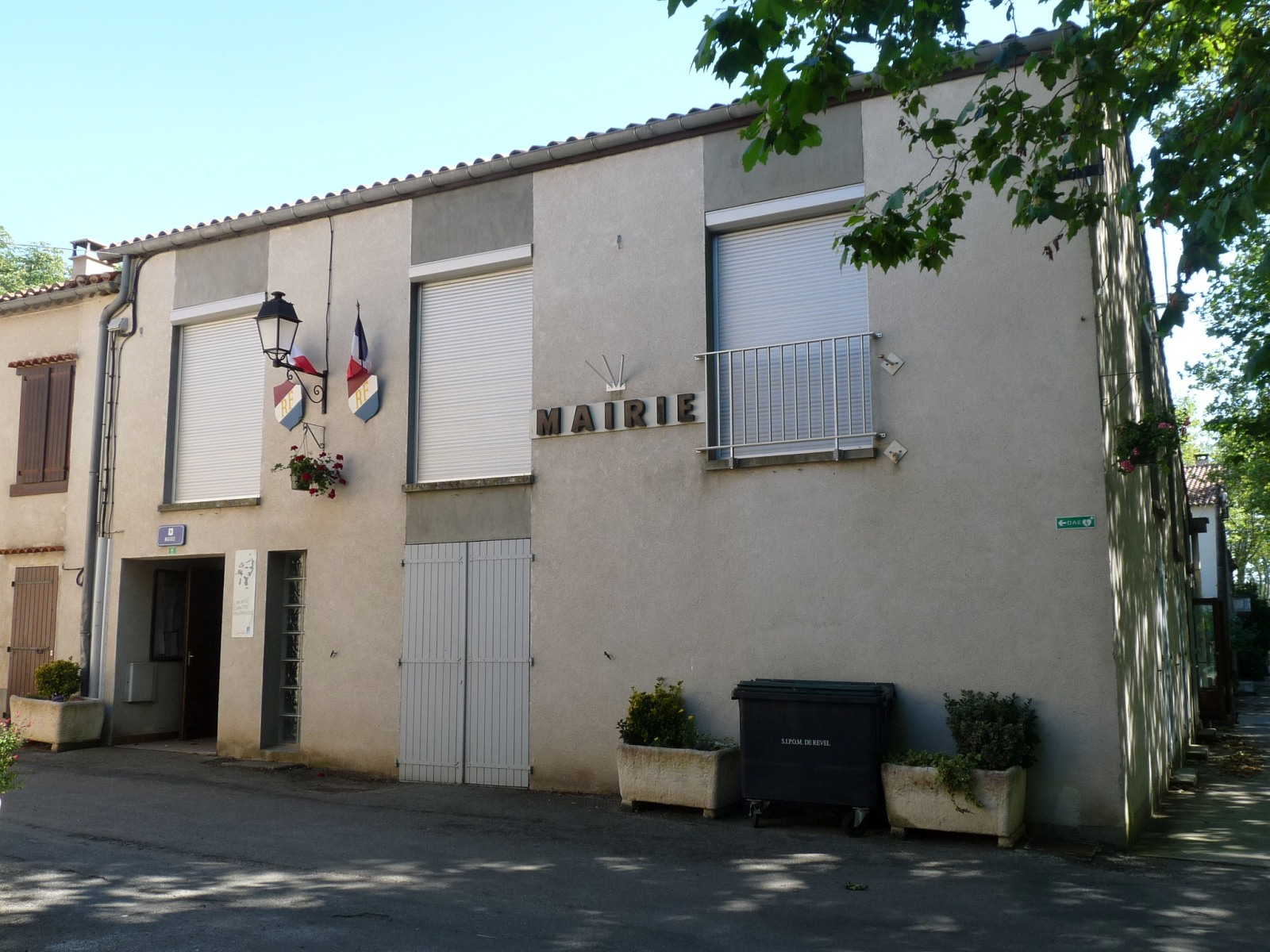 Mairie de Vaudreuille, Haute-Garonne, France